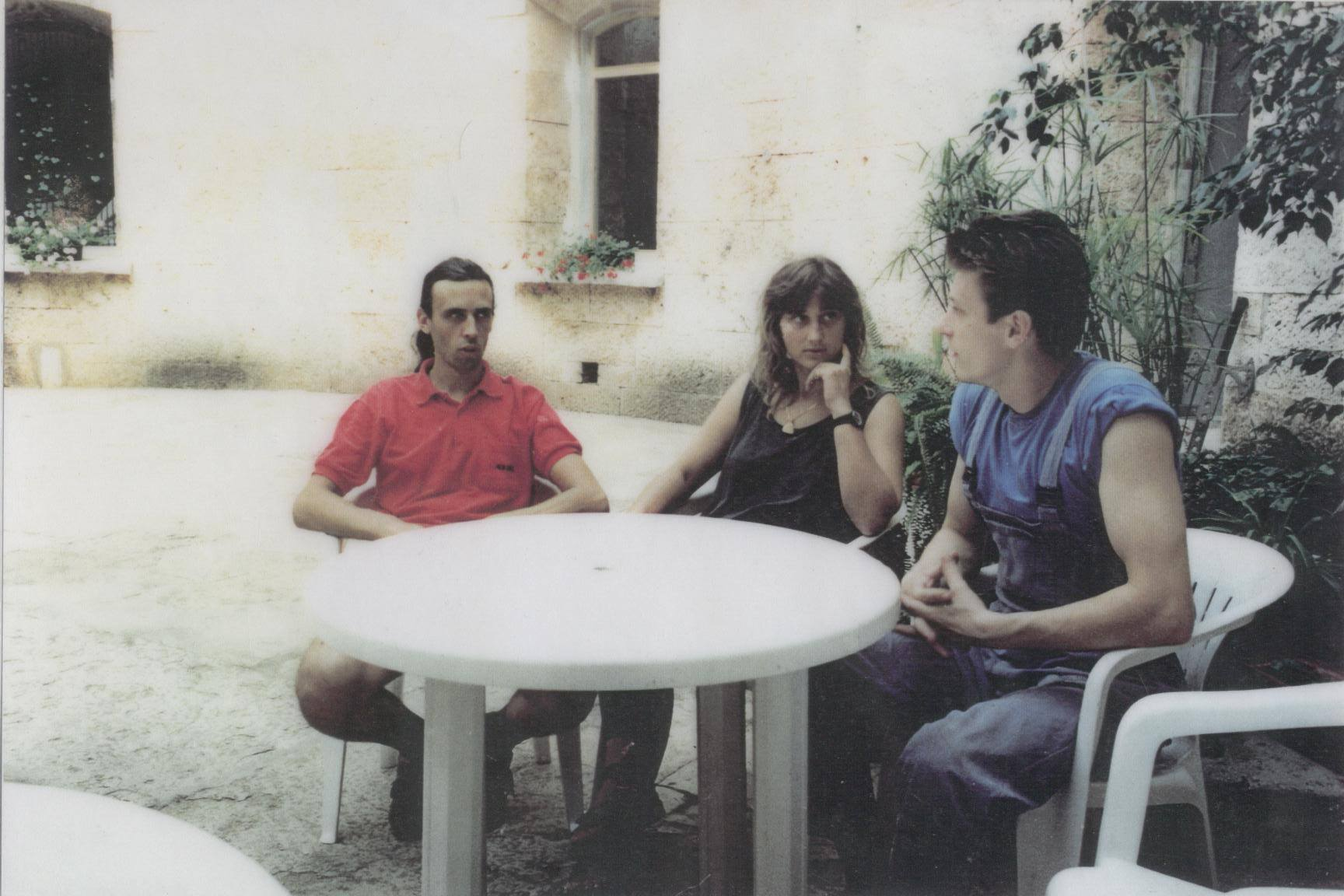 Slijeva na desno: Zlatko Devežić, Nina Devernaj i Alvaro Manzin